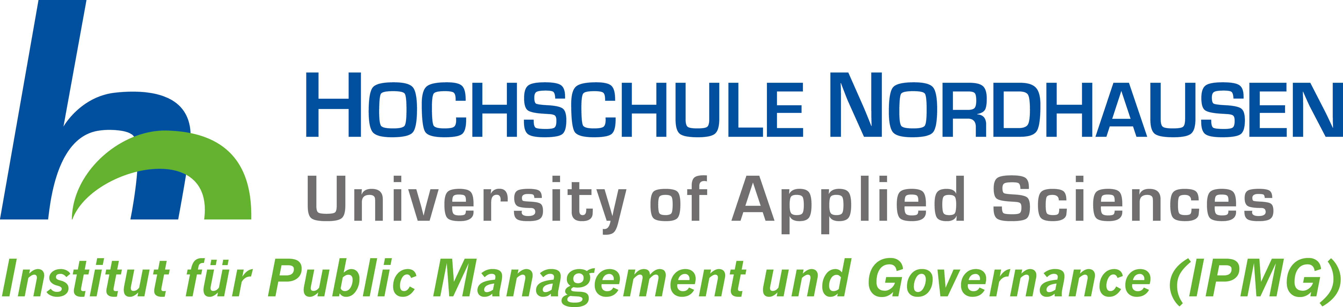 Logo IPMG